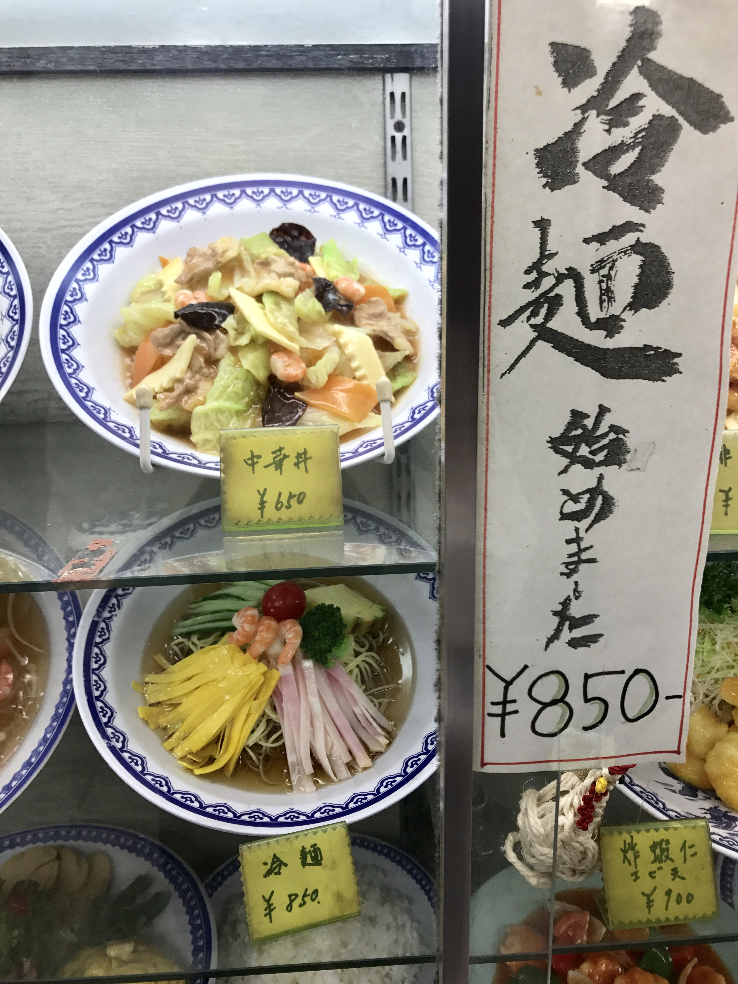 「冷やし中華始めました」ではなく「冷麺始めました」。新梅田食道街の中華料理店にて。